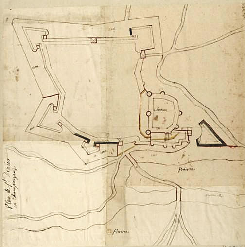 Plan de St Dizier en Champagne. Croquis : plume, encre de Chine et encres de couleur